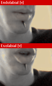 Prononciation des voyelles arrondies endolabiales et exolabiales